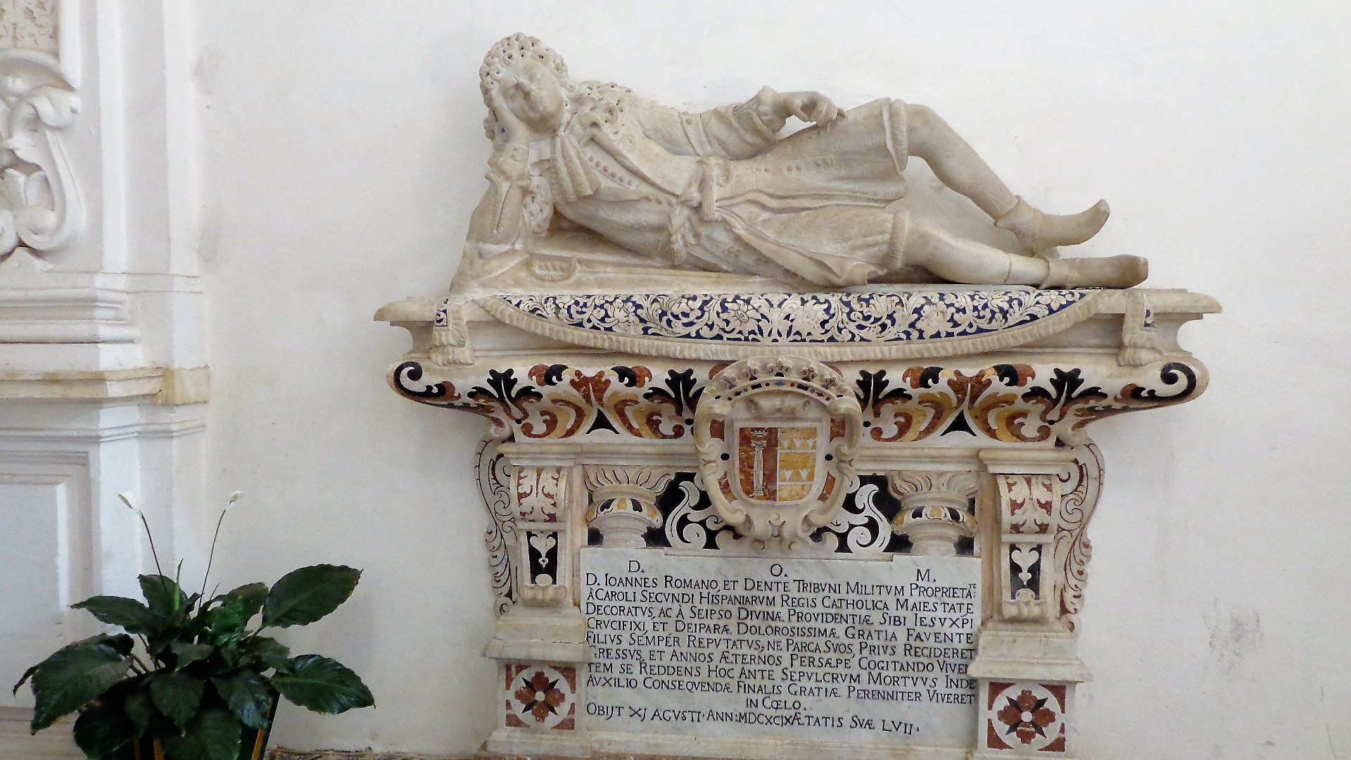 Sepolcro Romano e Dente.